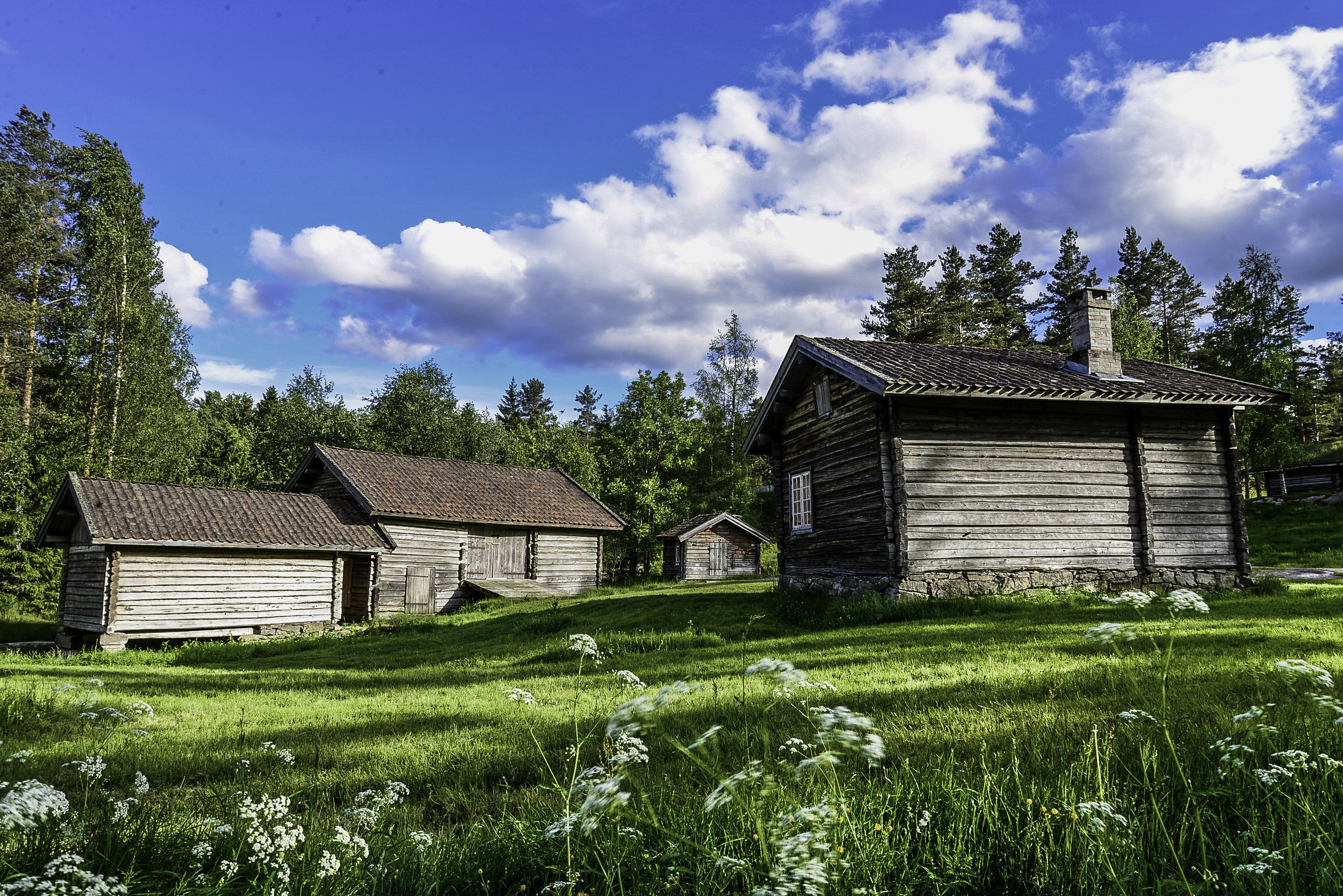 Mølleplassen på Kvennøya, tusenårsstedet i Bø i Telemark